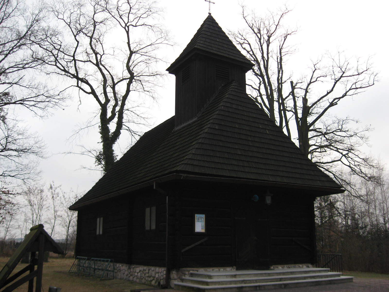 Kościół Podwyższenia Krzyża Świętego w Ligocie Górnej